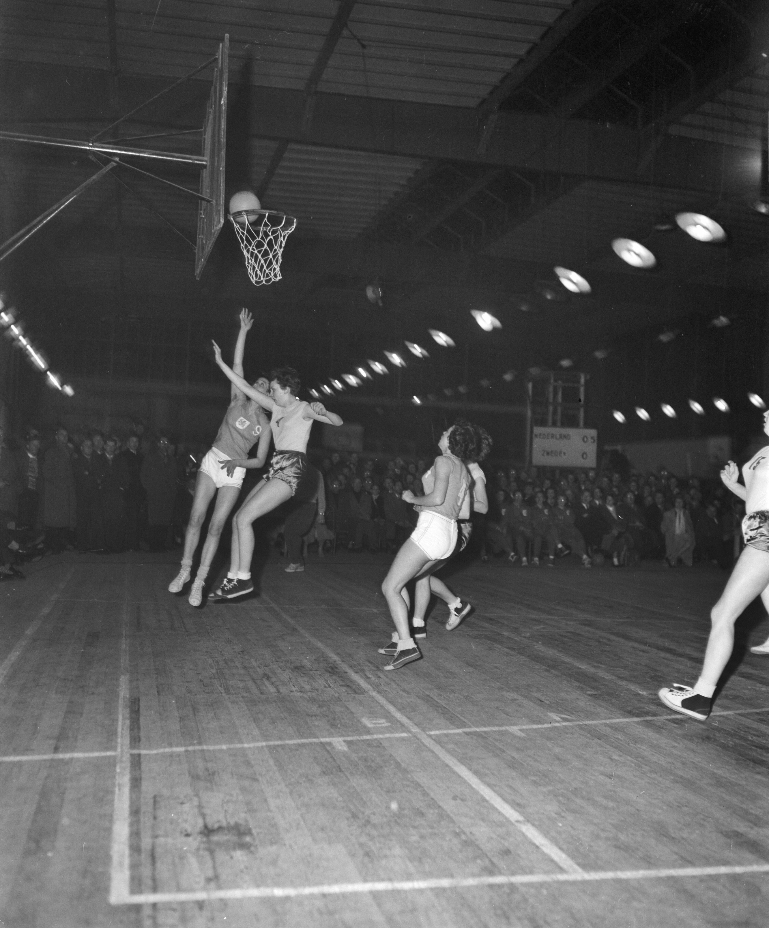 Collectie / Archief : Fotocollectie Anefo Reportage / Serie : [ onbekend ] Beschrijving : Basket dames Nederland tegen Zweden Datum : 7 april 1958 Locatie : Nederland, Zweden Trefwoorden : basketballen Fotograaf : Behrens, Herbert / Anefo Auteursrechthebbende : Nationaal Archief Materiaalsoort : Negatief (zwart/wit) Nummer archiefinventaris : bekijk toegang 2.24.01.04 Bestanddeelnummer : 909-4660